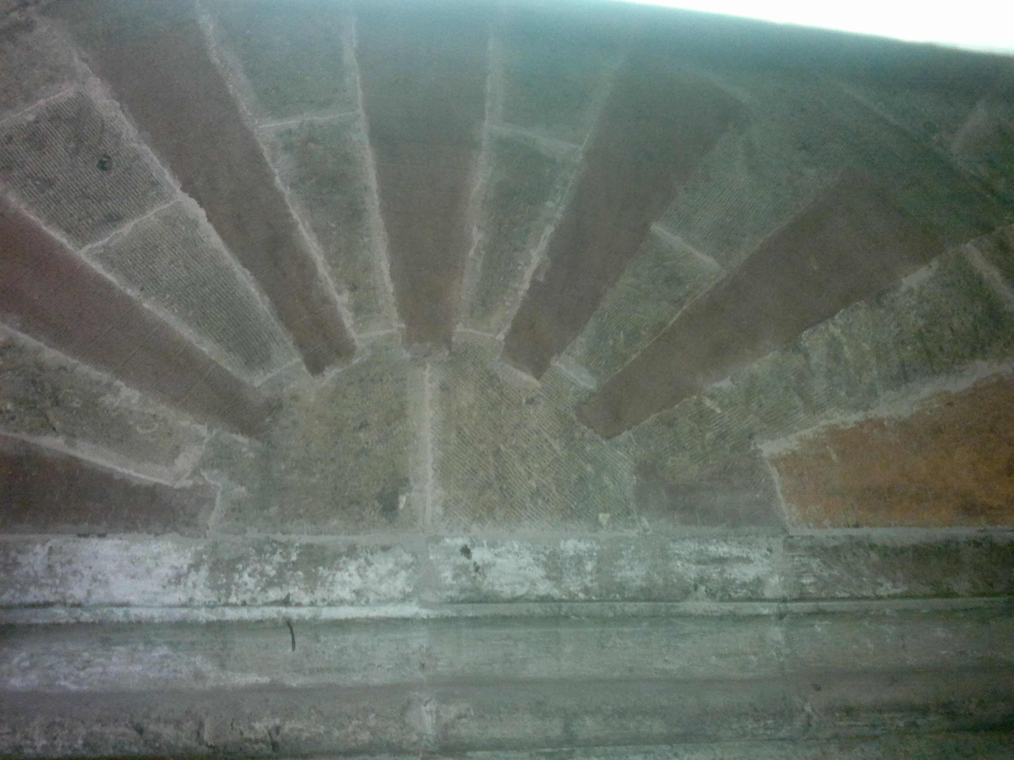 Erzurum Ulu Camii Doğu cephesi birinci kapı giriş iç sağ duvardaki güneş motifi